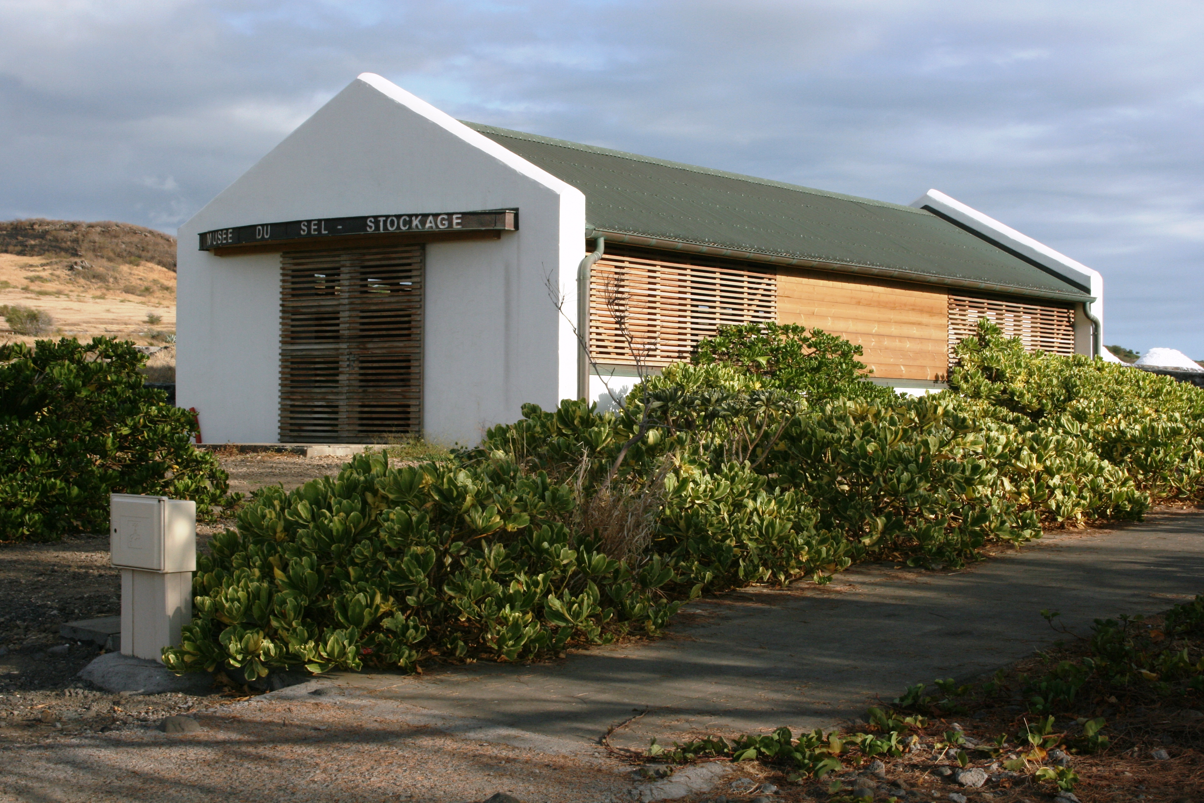 Bâtiment de stockage au musée du Sel à Saint-Leu, sur l'île de La Réunion.